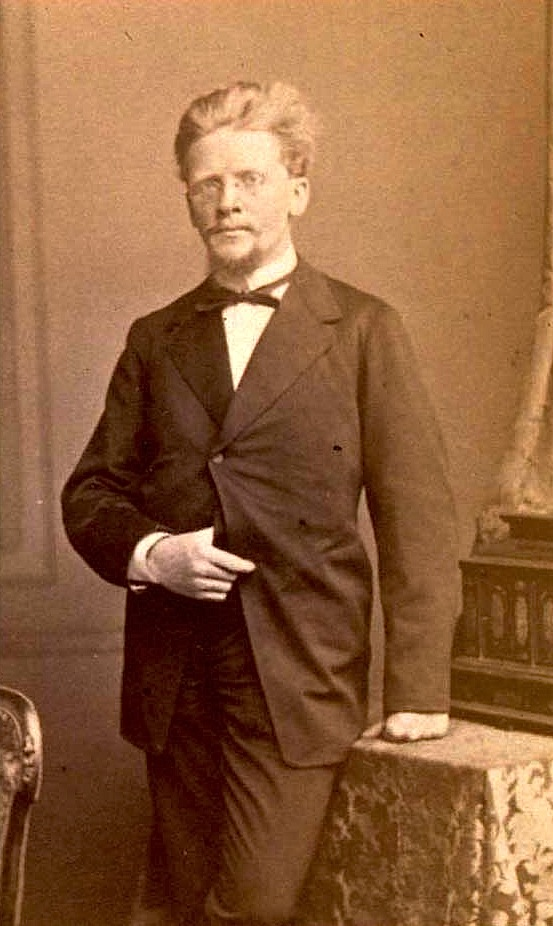 Louis Adolphe Spach, né à Strasbourg le 27 septembre 1800 et décédé dans la même ville le 16 octobre 1879, est un pédagogue, archiviste et écrivain alsacien. Il fut également Secrétaire général de l'Église luthérienne